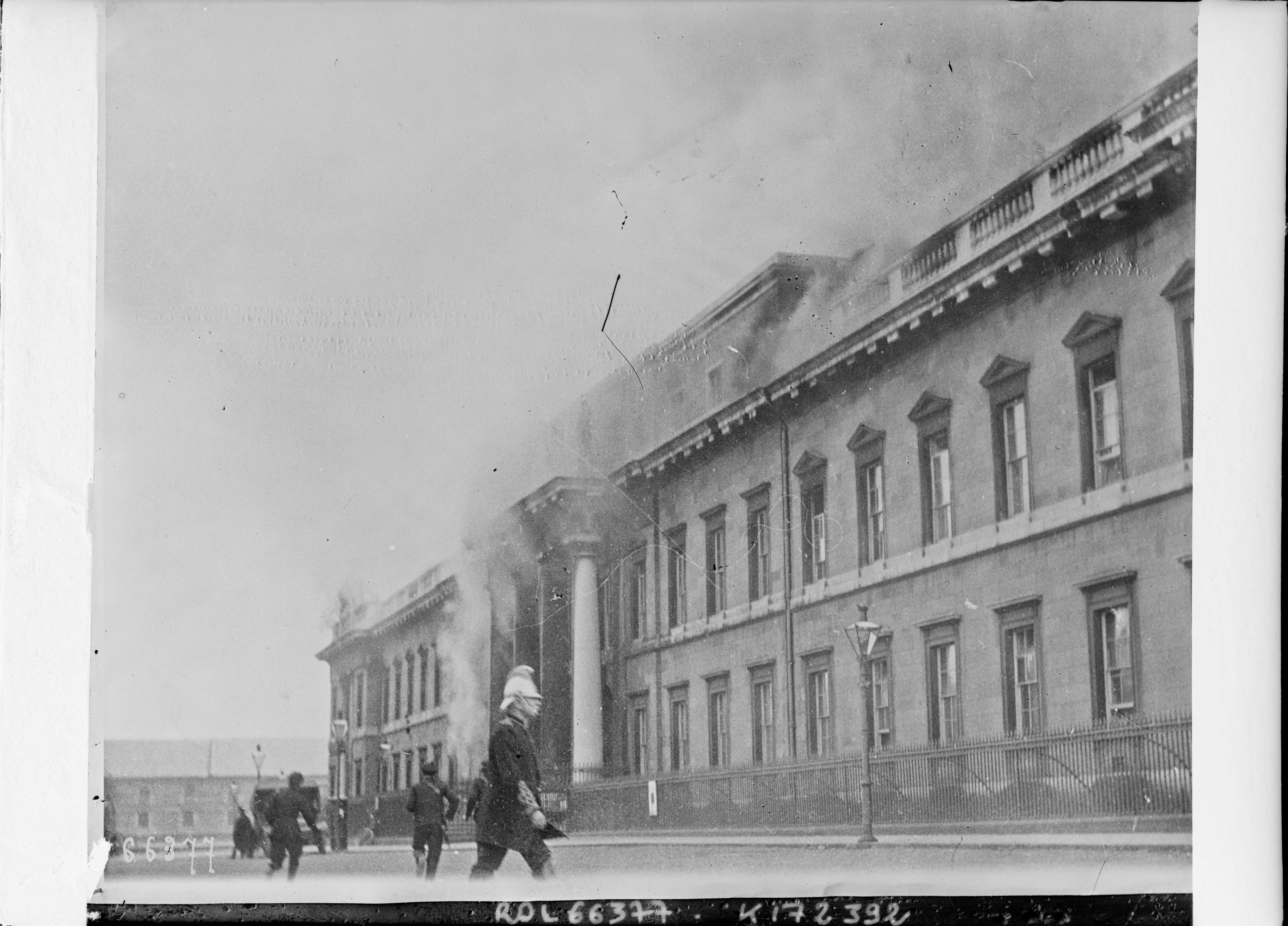 maison des douanes en feu, Dublin, 25 mai 1921